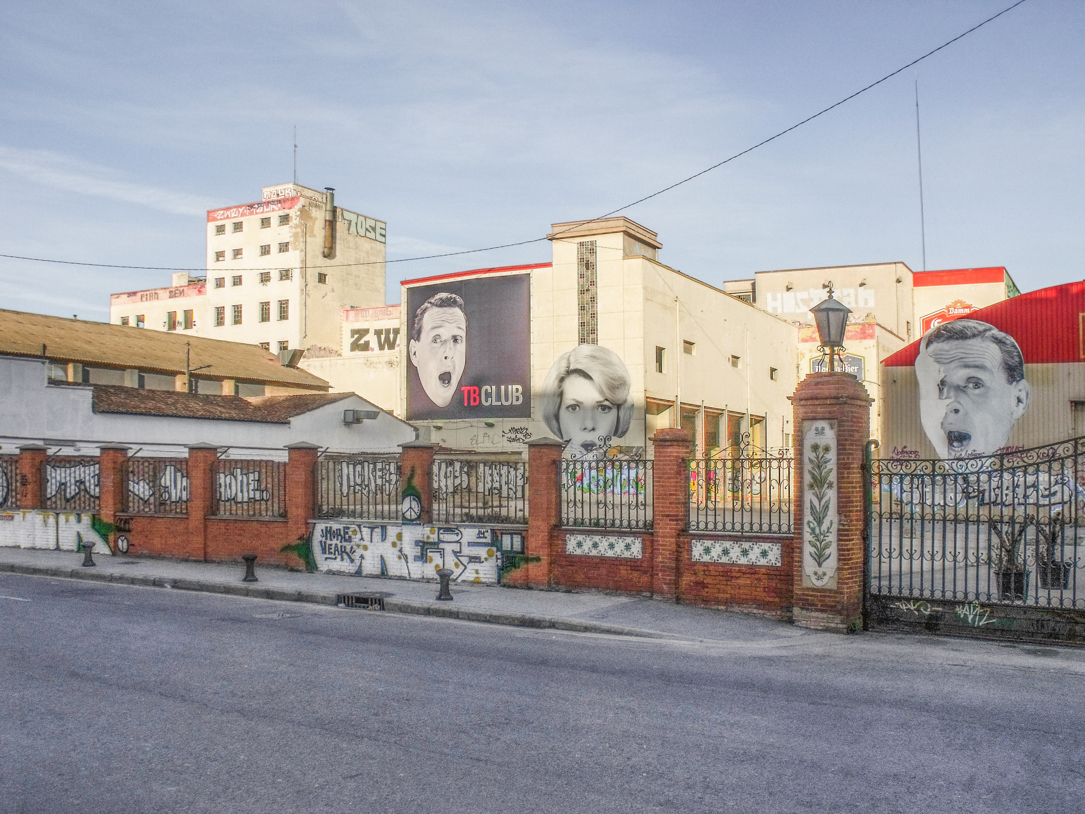 Antigua fábrica de cerveza.